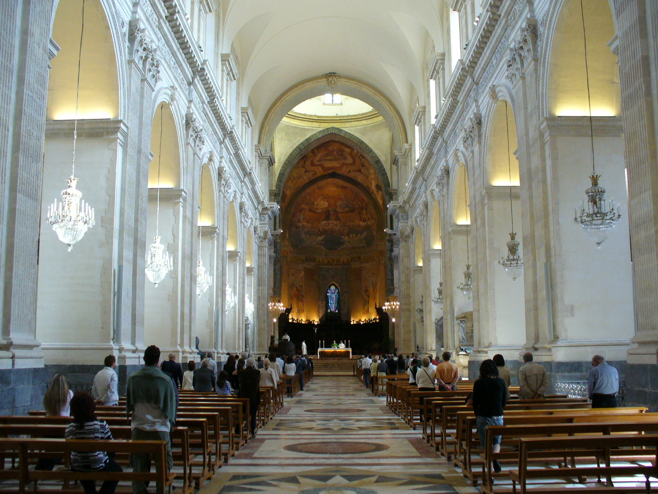 Uma missa na Catedral da Piazza Duomo.